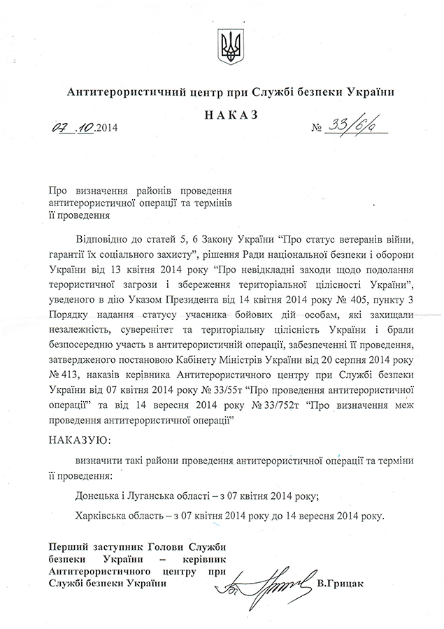 Наказ Антитерористичного центру при Службі безпеки України від 07.10.2014 р. № 33/6/а "Про визначення районів проведення антитерористичної операції та термінів її проведення"